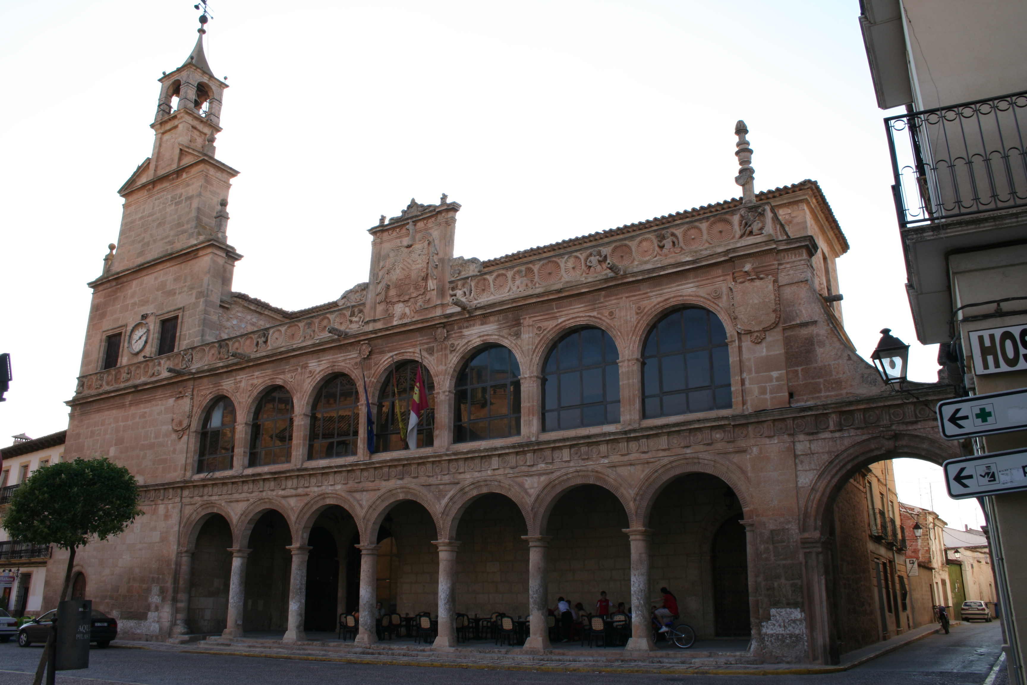 San Clemte provincia de Cuenca.